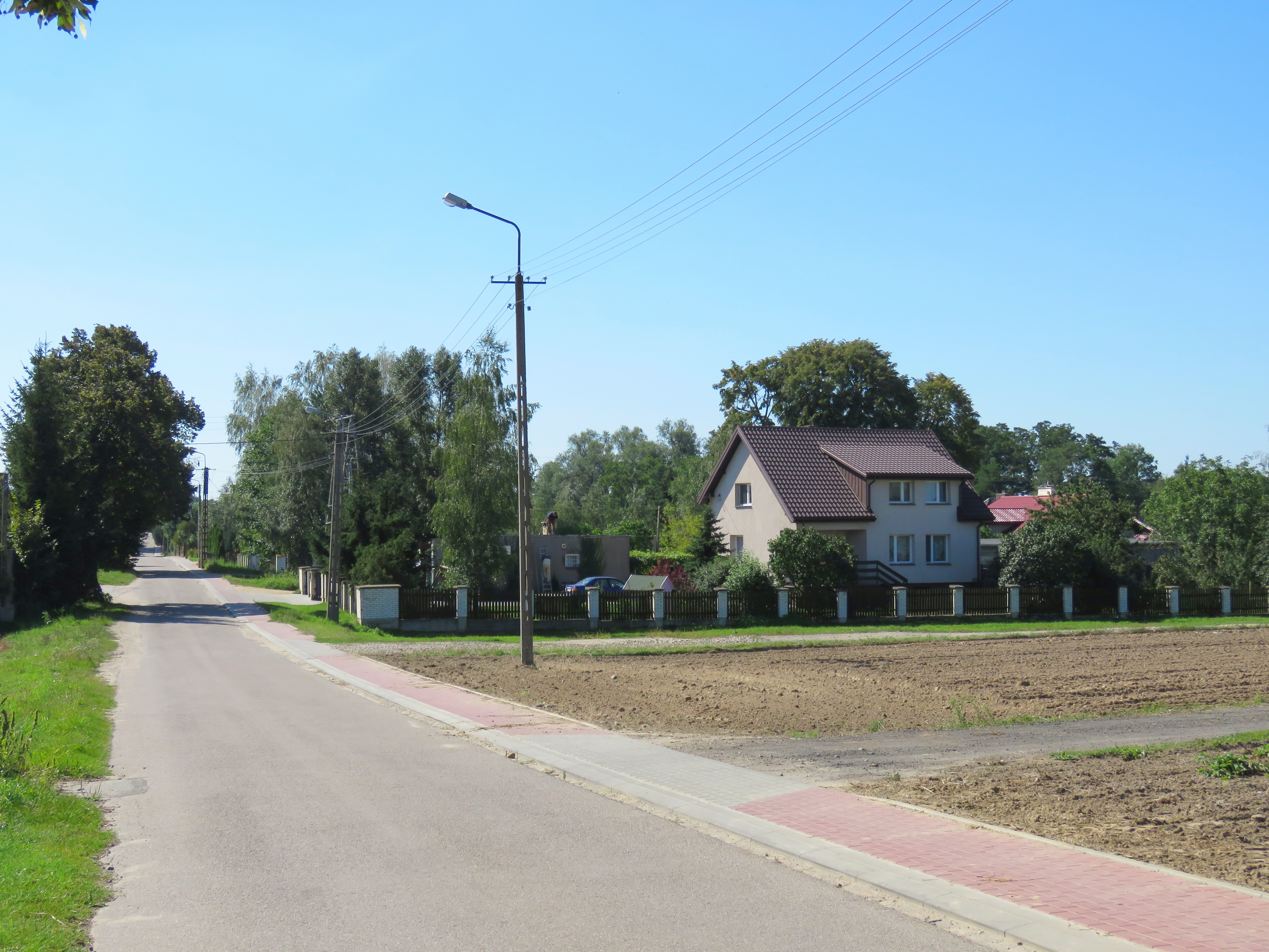 Trębki Stare